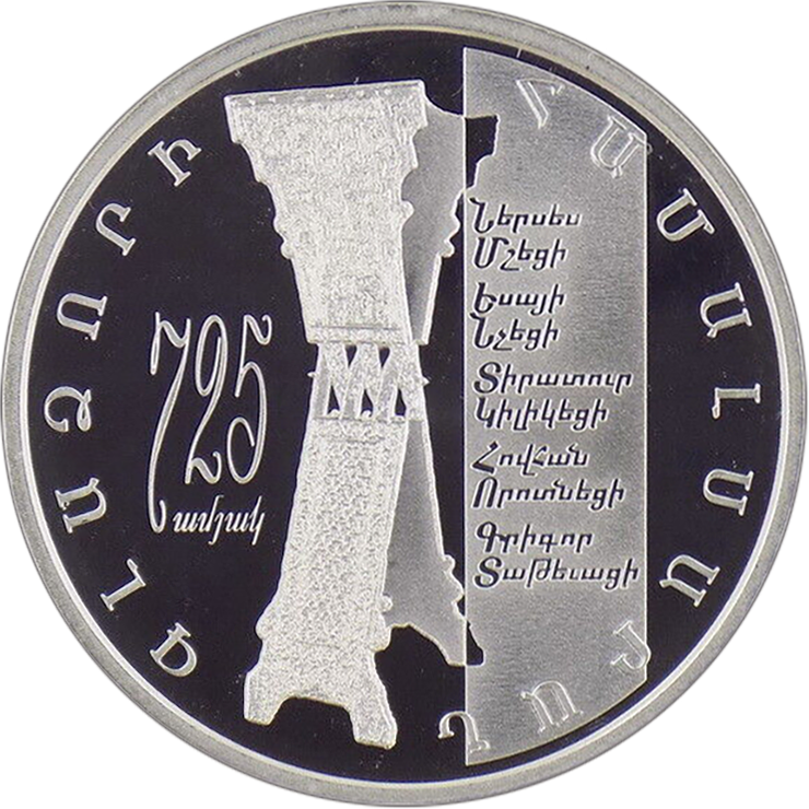 Памятная монета Армении 2009 года "Гладзорский университет" - 1000 драм - серебро 999